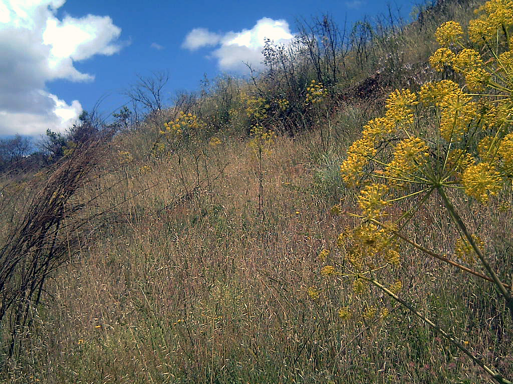 Thapsia villosa Habitus, Puertollano, May, 24 , 2008.